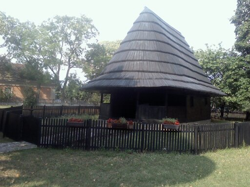 Crkva brvnara u Brzanu sagrađena 1822. godine.